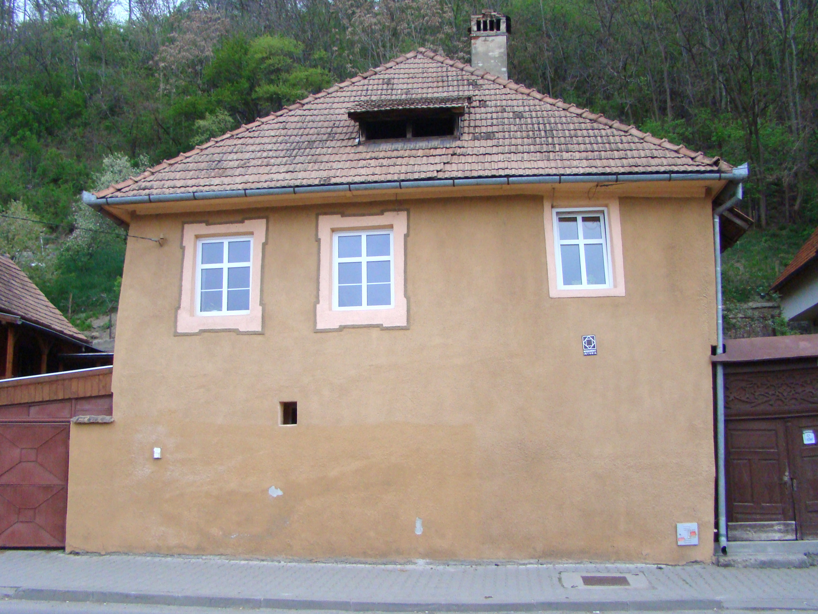 Casă, municipiul Sighișoara, str. Chendi Ilarie 58 sec. XIX